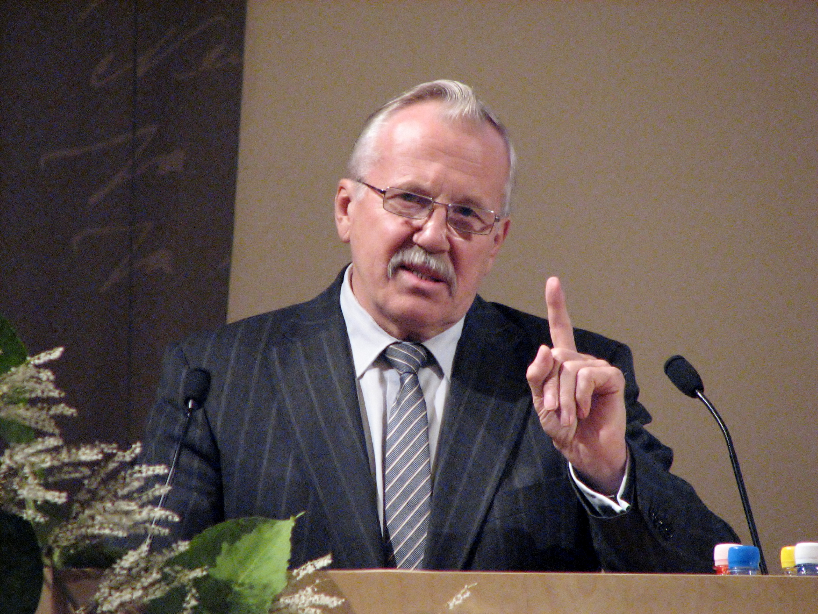 Arvi Altmäe esinemas Maaema messil 2012 Eesti Kodukaunistamise Ühenduse juhatuse esimehena.